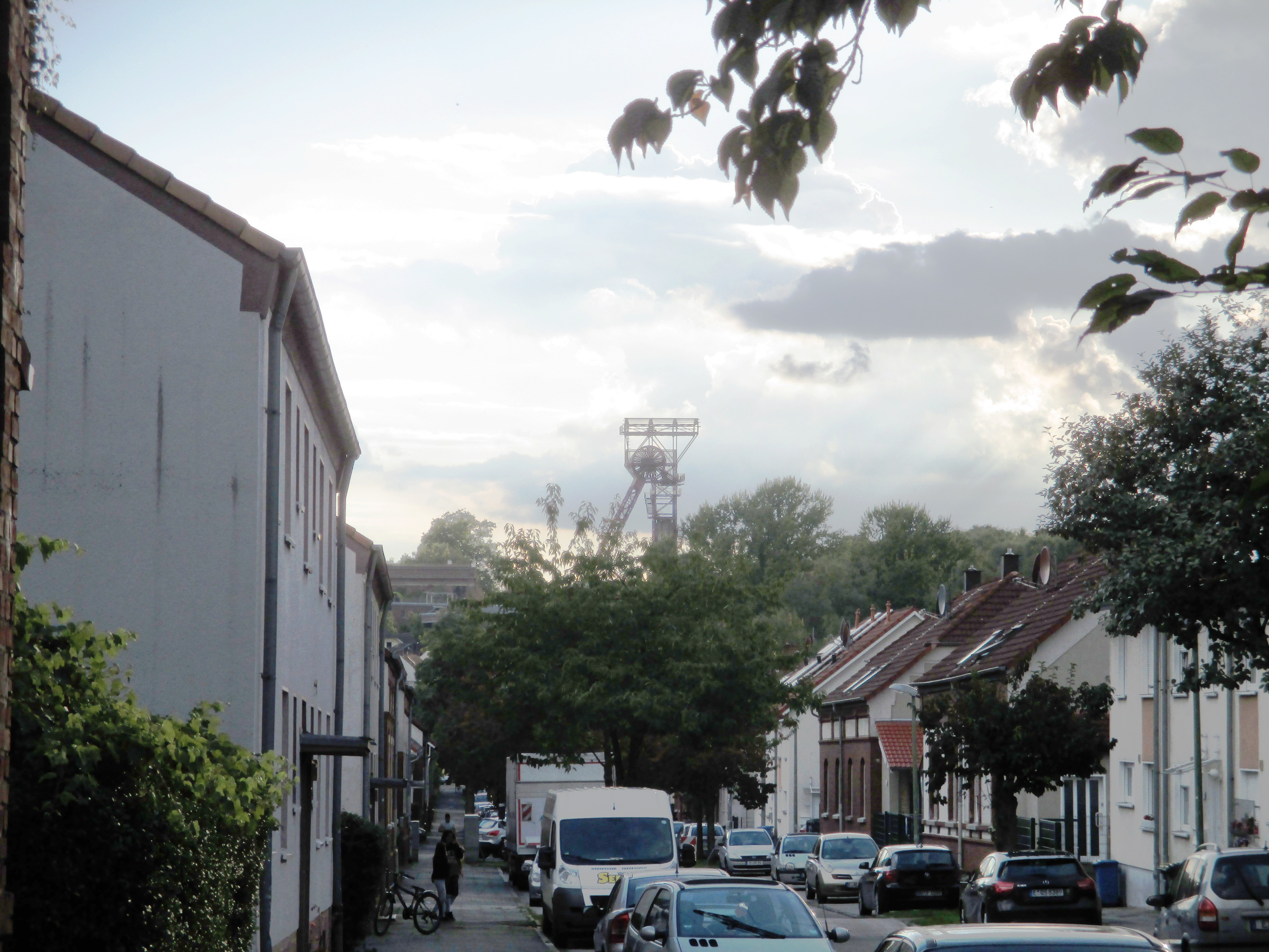 Das "Königreich Beisen" ist eine Arbeitersiedlung in Essen-Katernberg. Sie liegt östlich der Schachtanlage 3/7/10 der Zeche Zollverein an der Grenze zu Gelsenkirchen-Rotthausen.This is a photograph of an architectural monument., no. 0